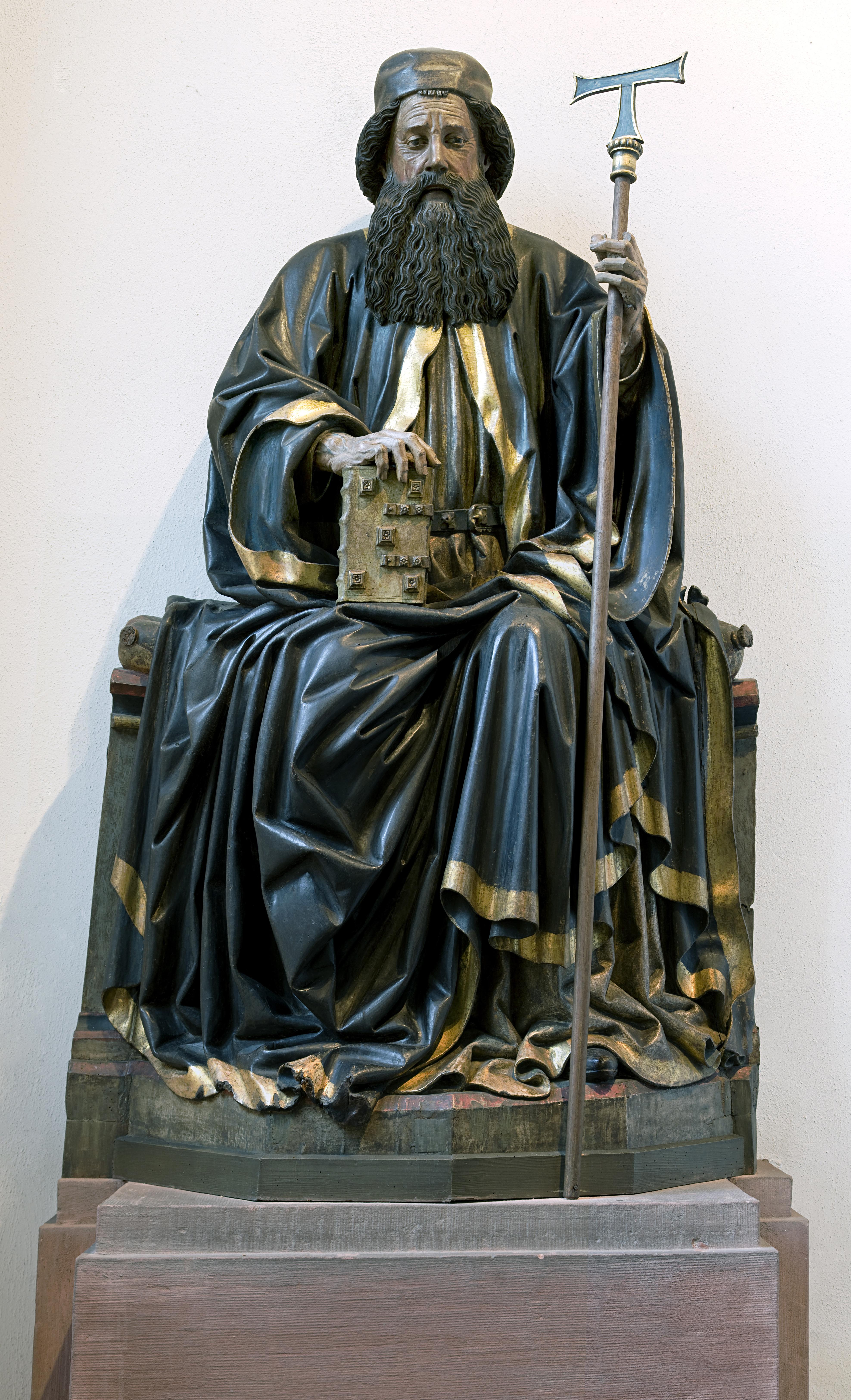 Figur des Hl. Antonius in der Justinuskirche Frankfurt-Höchst